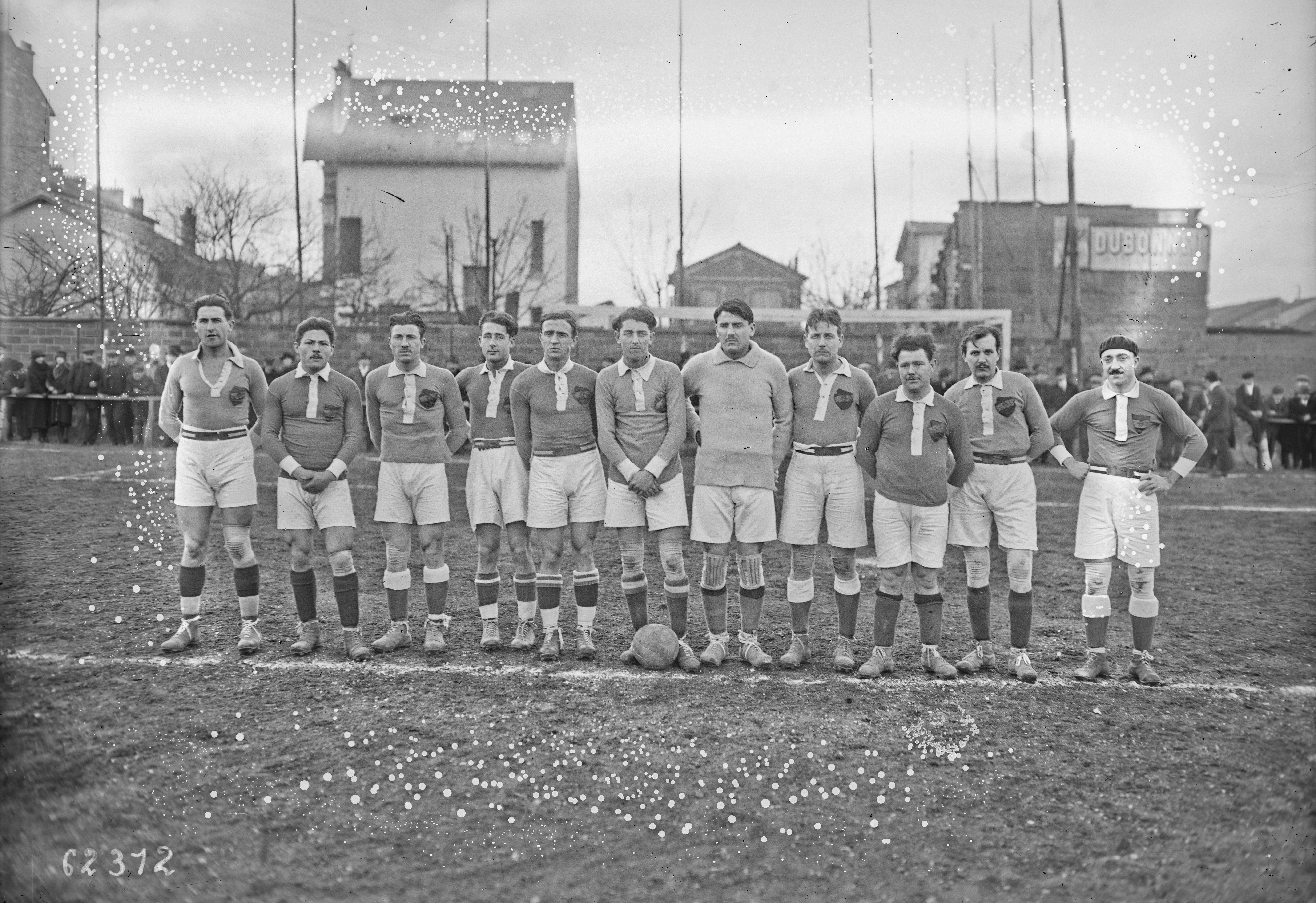 [Football] association, 28/11/20, Charentonneau, équipe Olympique.